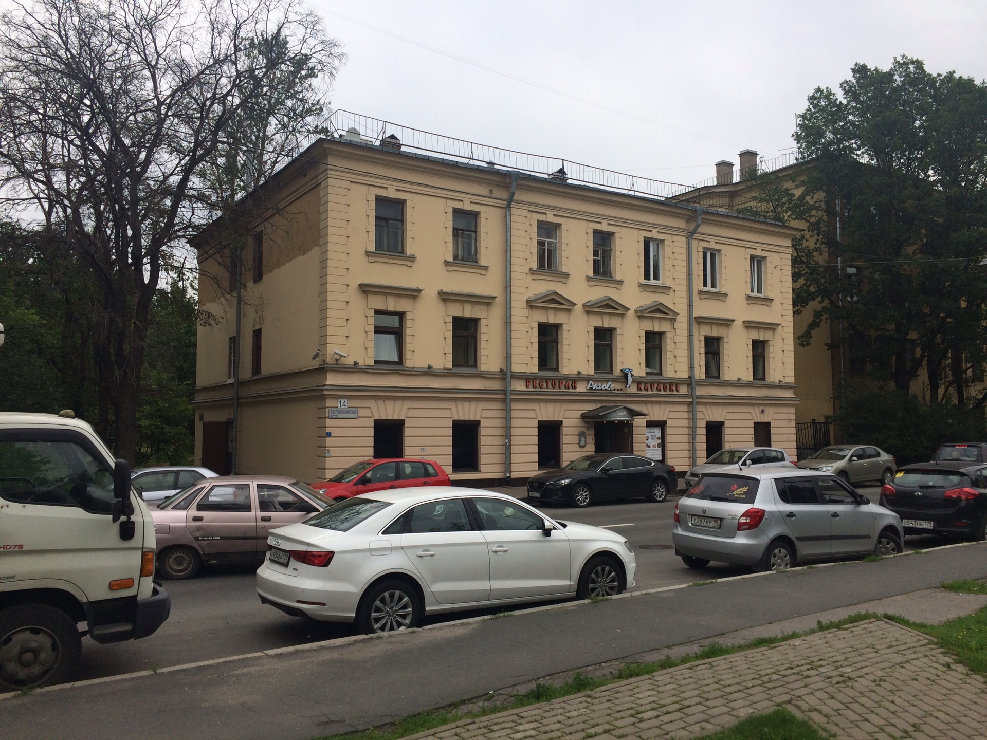 Республиканская улица, дом 14 В этом здании в 1941 году размещался госпиталь